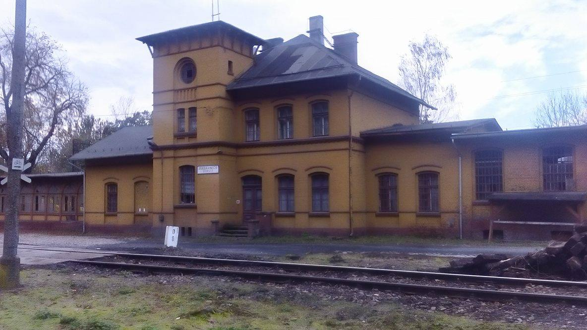 Stacja kolejowa - widok od strony Kruczych Skał